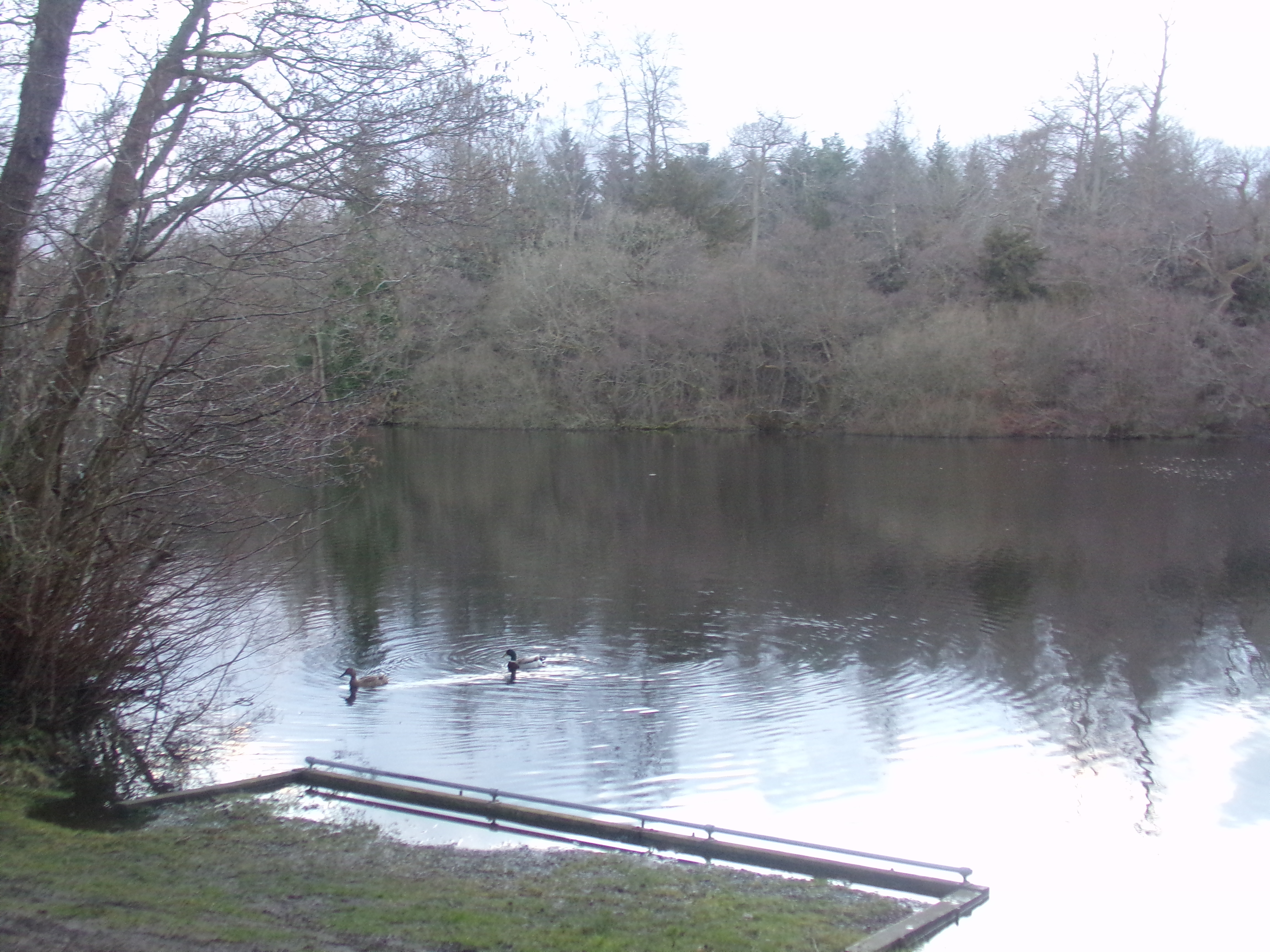 Llyn Ty'n y Llyn